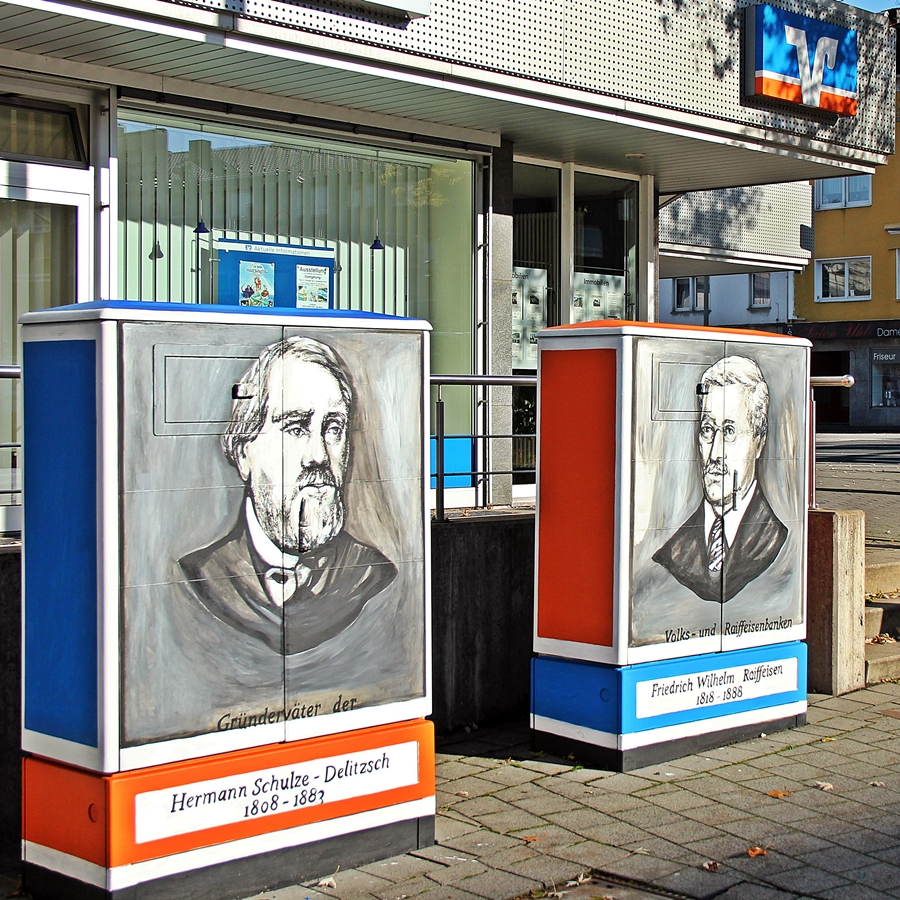 Hermann Schulze-Delitzsch und Friedrich Wilhelm Raiffeisen auf Stromkästen an Kochs Ecke in Siegen